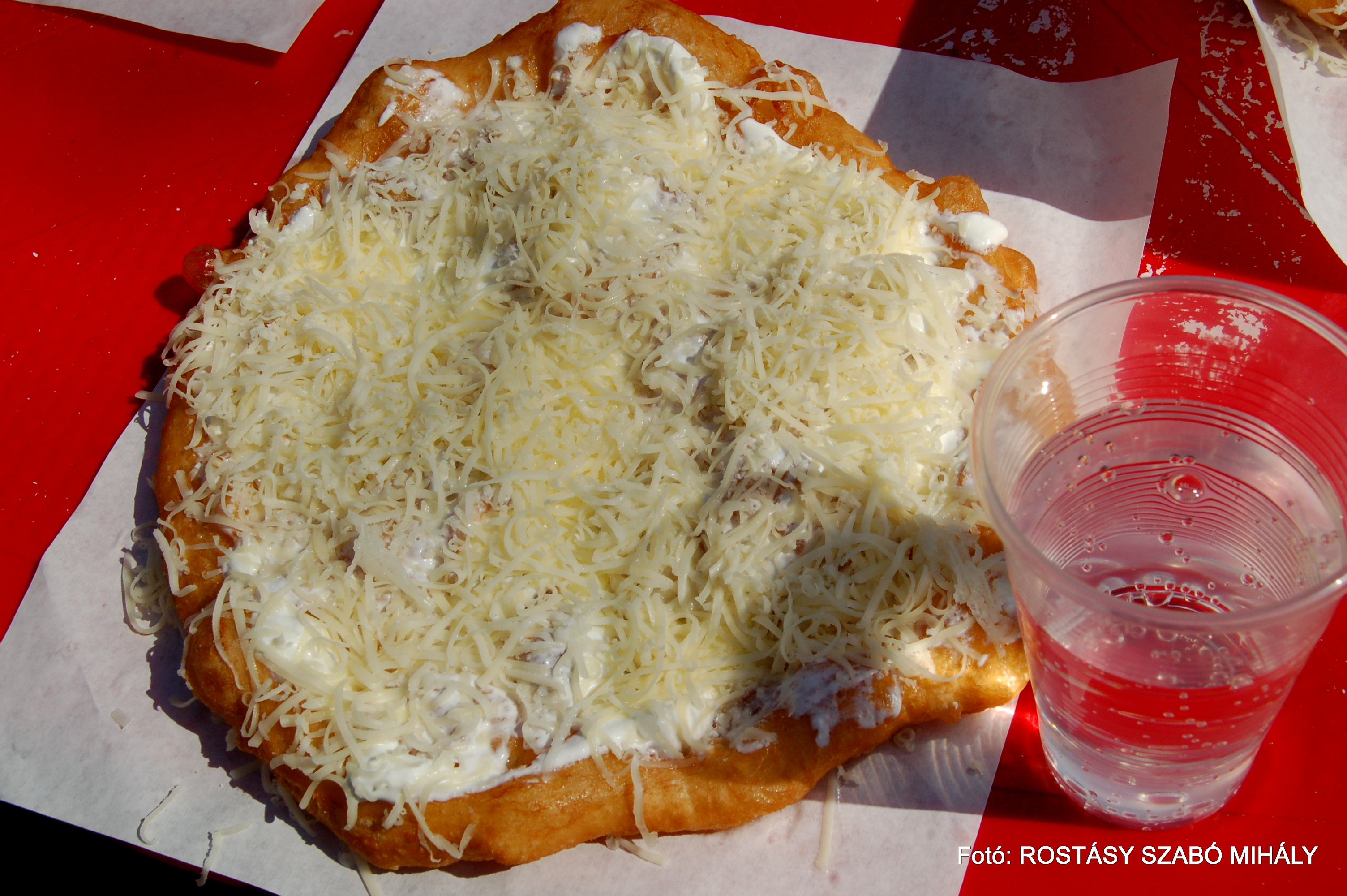 Népszerű és finom..